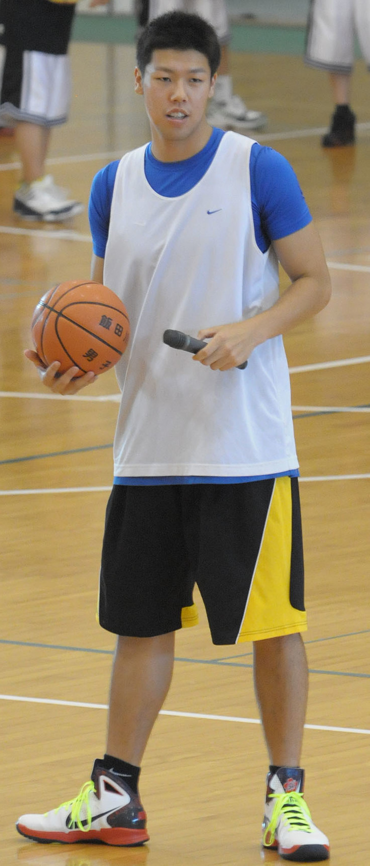 秋田ノーザンハピネッツ、菅澤紀行選手。広域五城目体育館で。